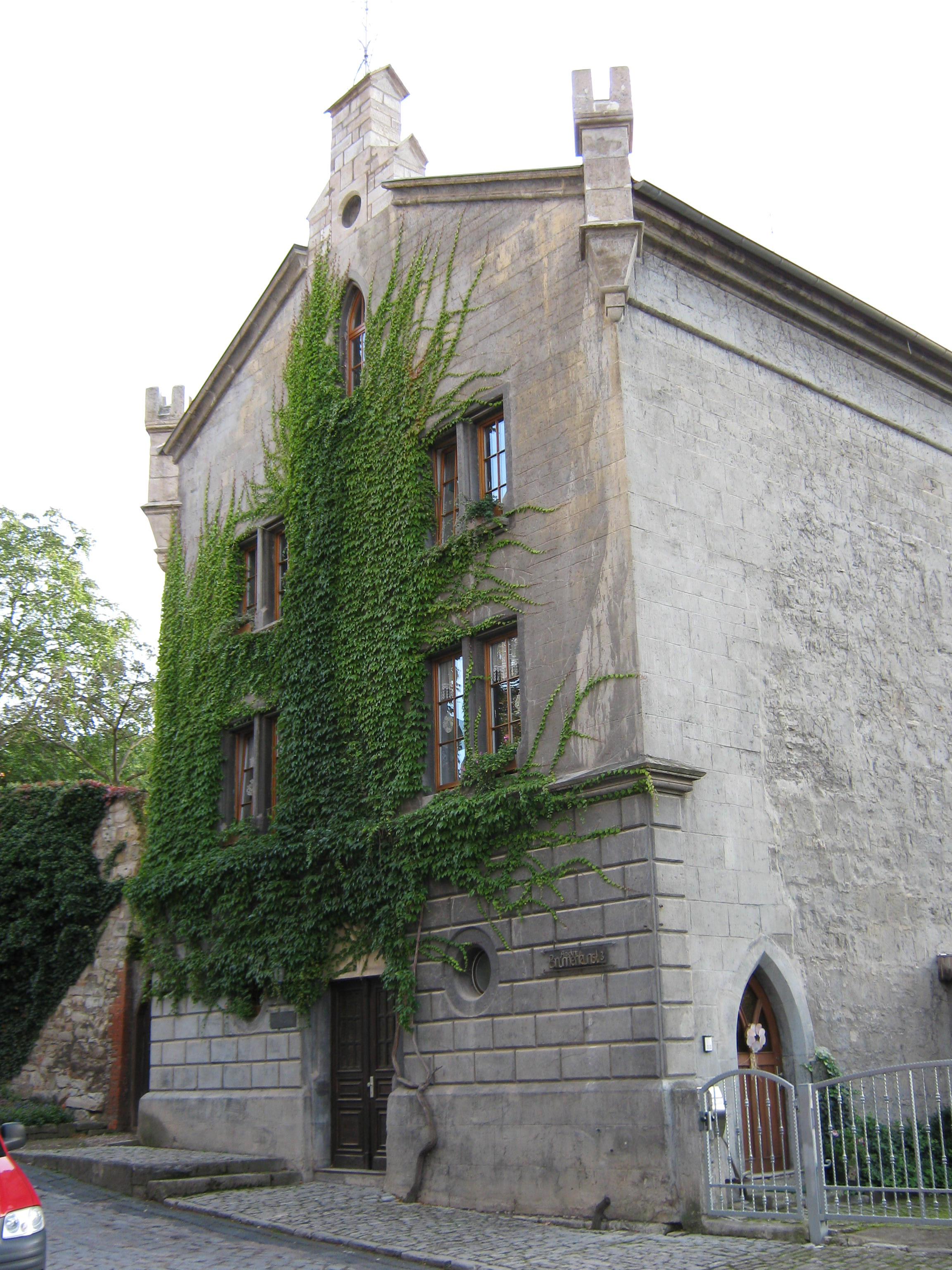 Brunnenkunst in Arnstadt, neben der Liebfrauenkirche